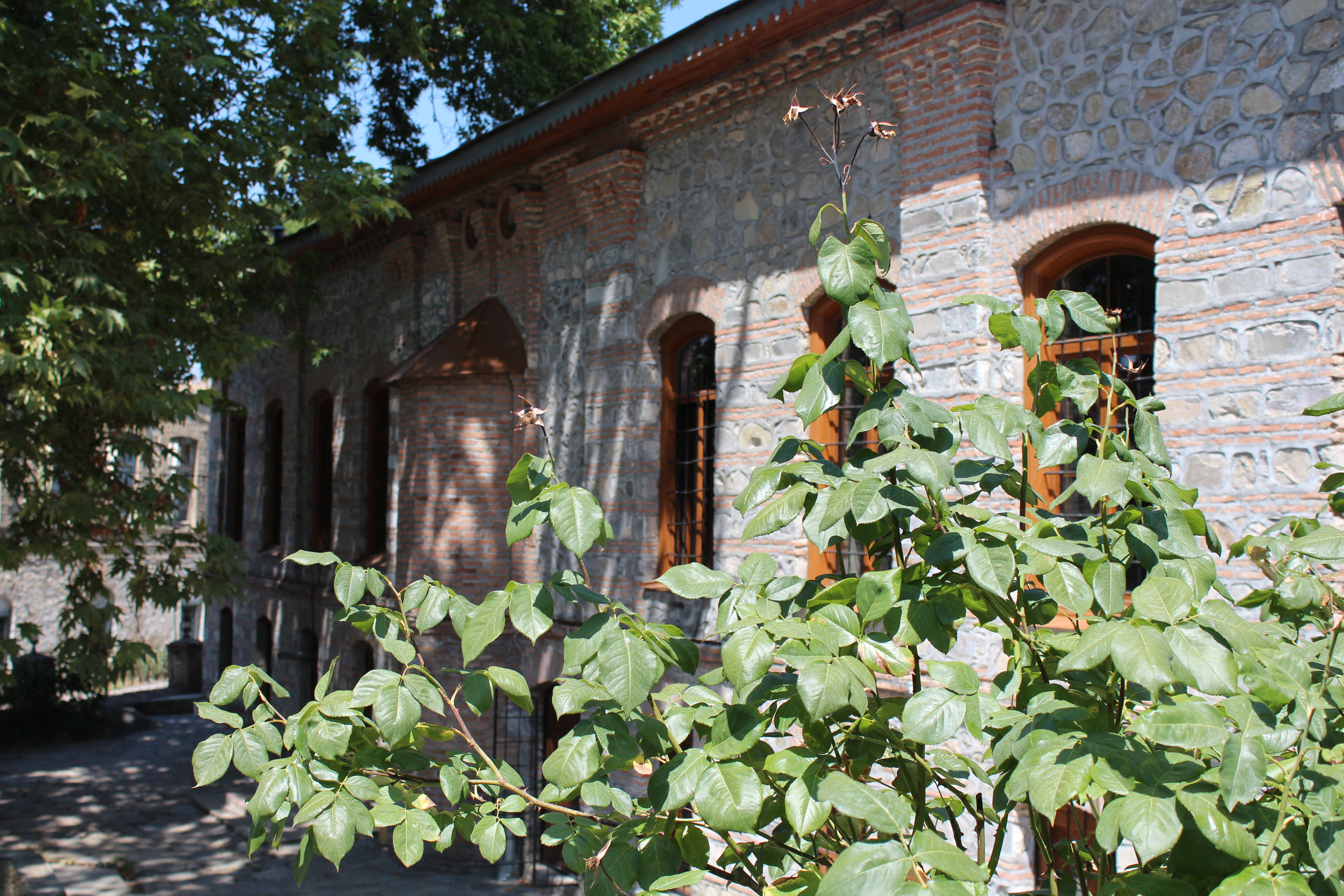 İmam Əli məscidi (Şəki)